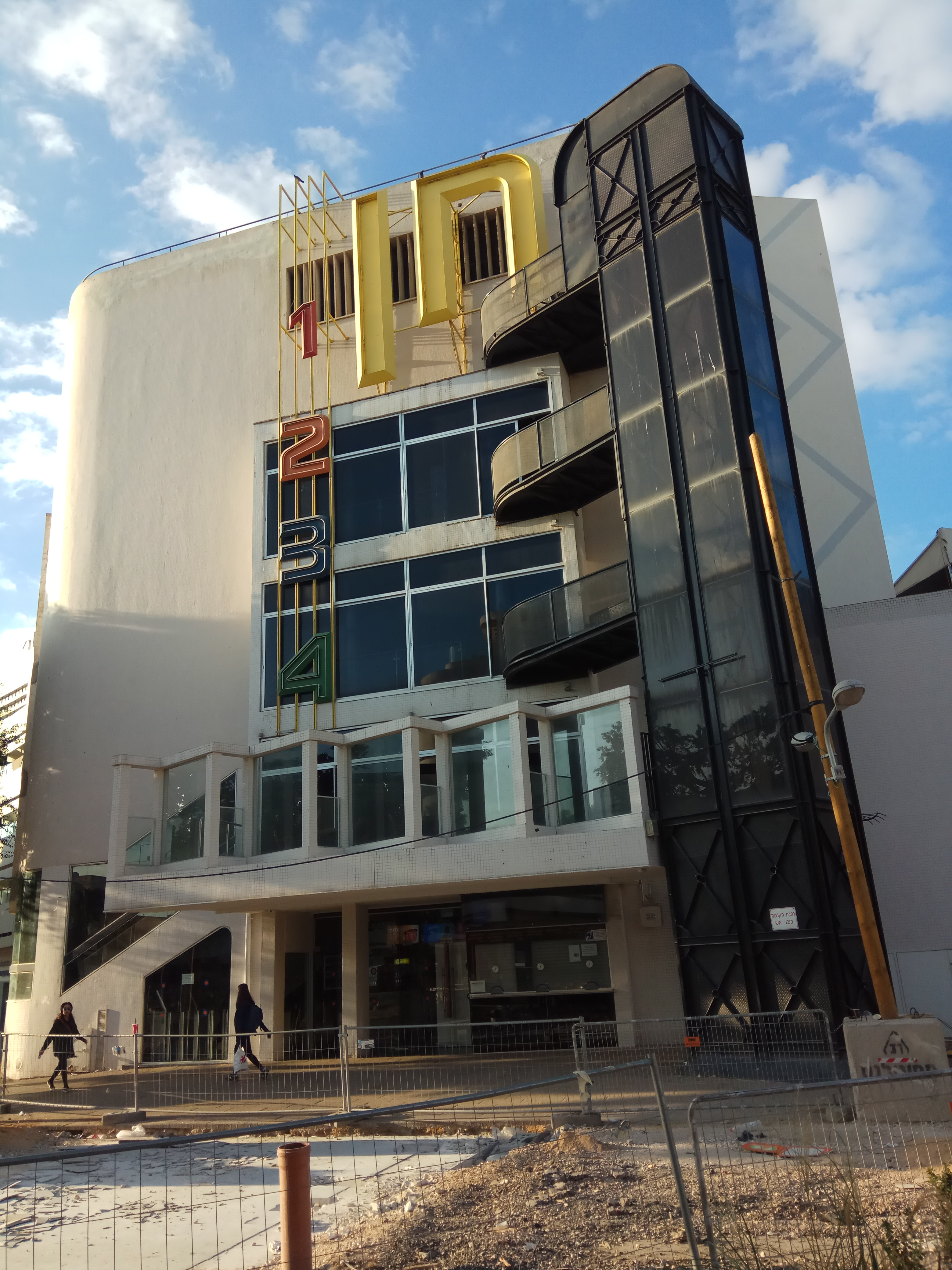 קולנוע רב חן בתל אביב